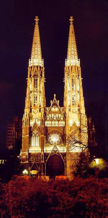 Kościół Wotywny w Wiedniu, fot. Chepry (Andrzej Barabasz) 2002 r.